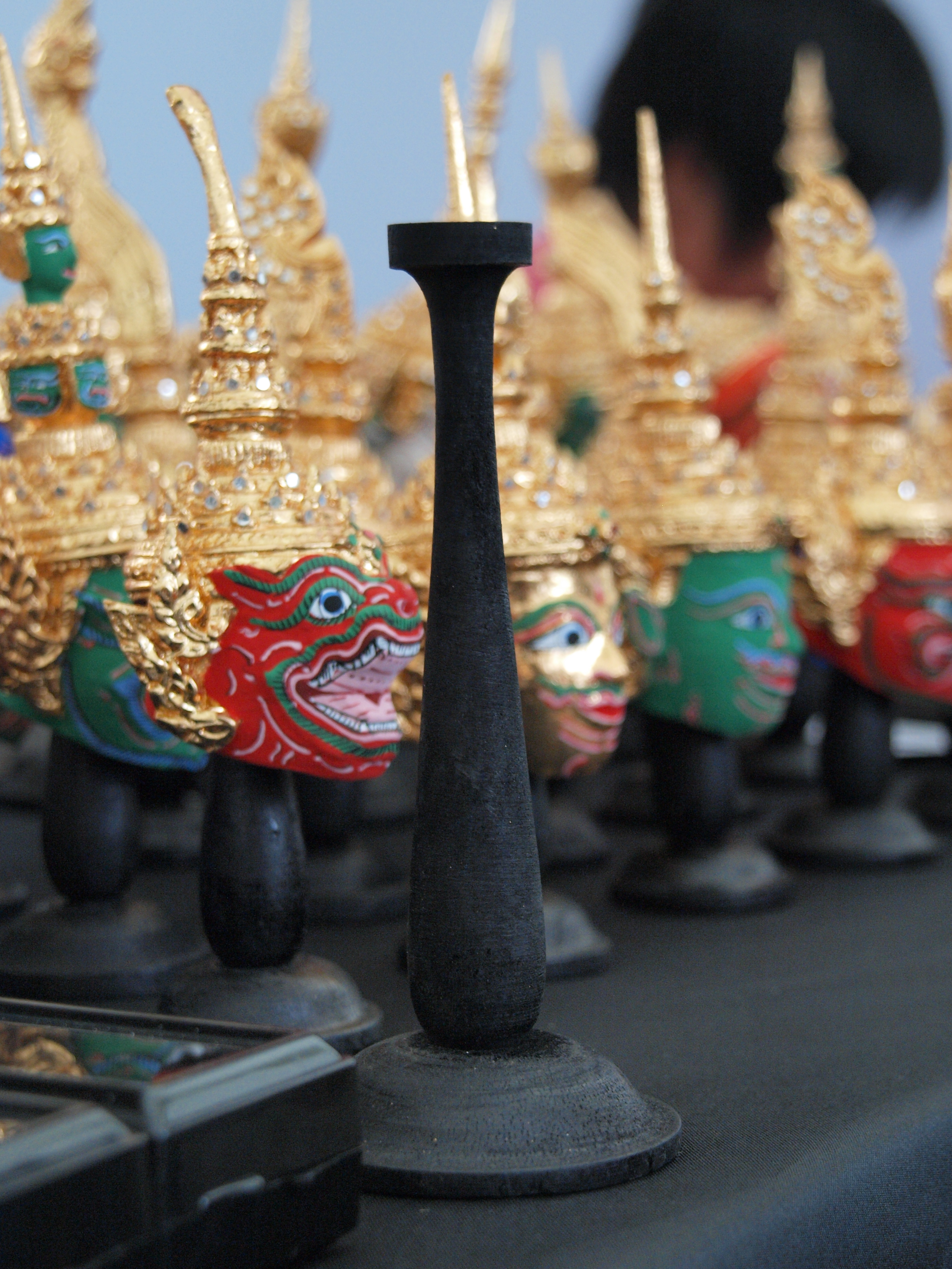 ภาพถ่ายทวนสำหรับวางหัวโขน ถ่ายจากงาน "กรุงเทพฯ ถนนวัฒนธรรม" ของดีเขตคลองสาน ระหว่างวันที่ 1-5 กันยายน 2553